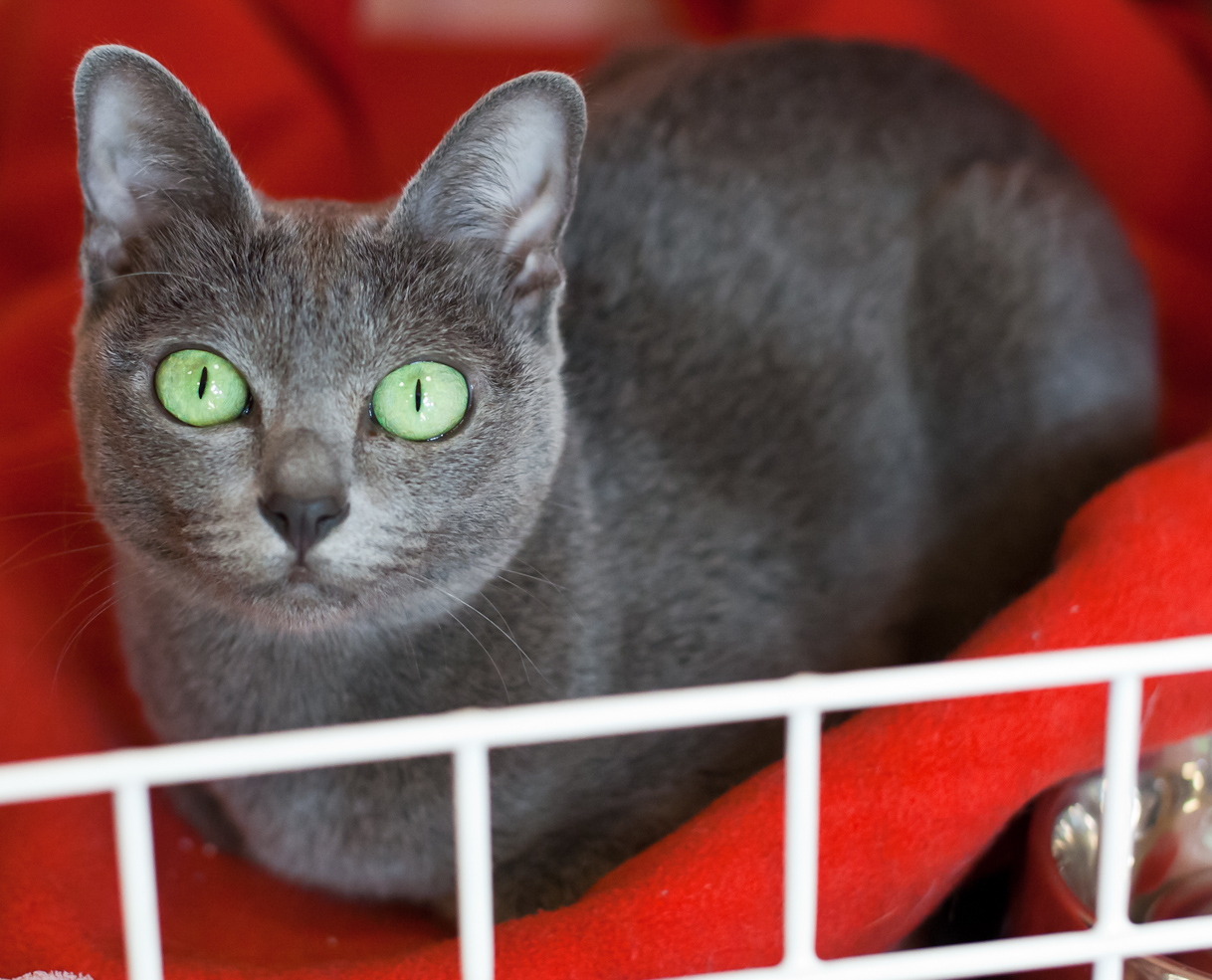 Tatsutan Kaia Aiji-Amalam, korat dans une présentation du Korat Club finlandais.